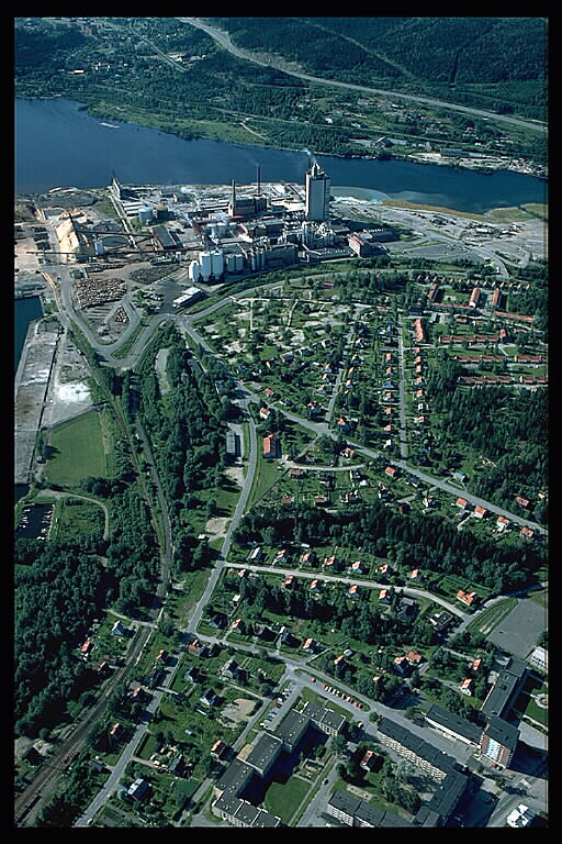 Sulfatmassafabriken i bildens övre del. Bilden troligen från början av 1980-talet. Motiv: Östrand Nyckelord: Flygbilder Kategori: Massa- och papperstillvSulfatmassafabriken i bildens övre del. Bilden troligen från början av 1980-talet.